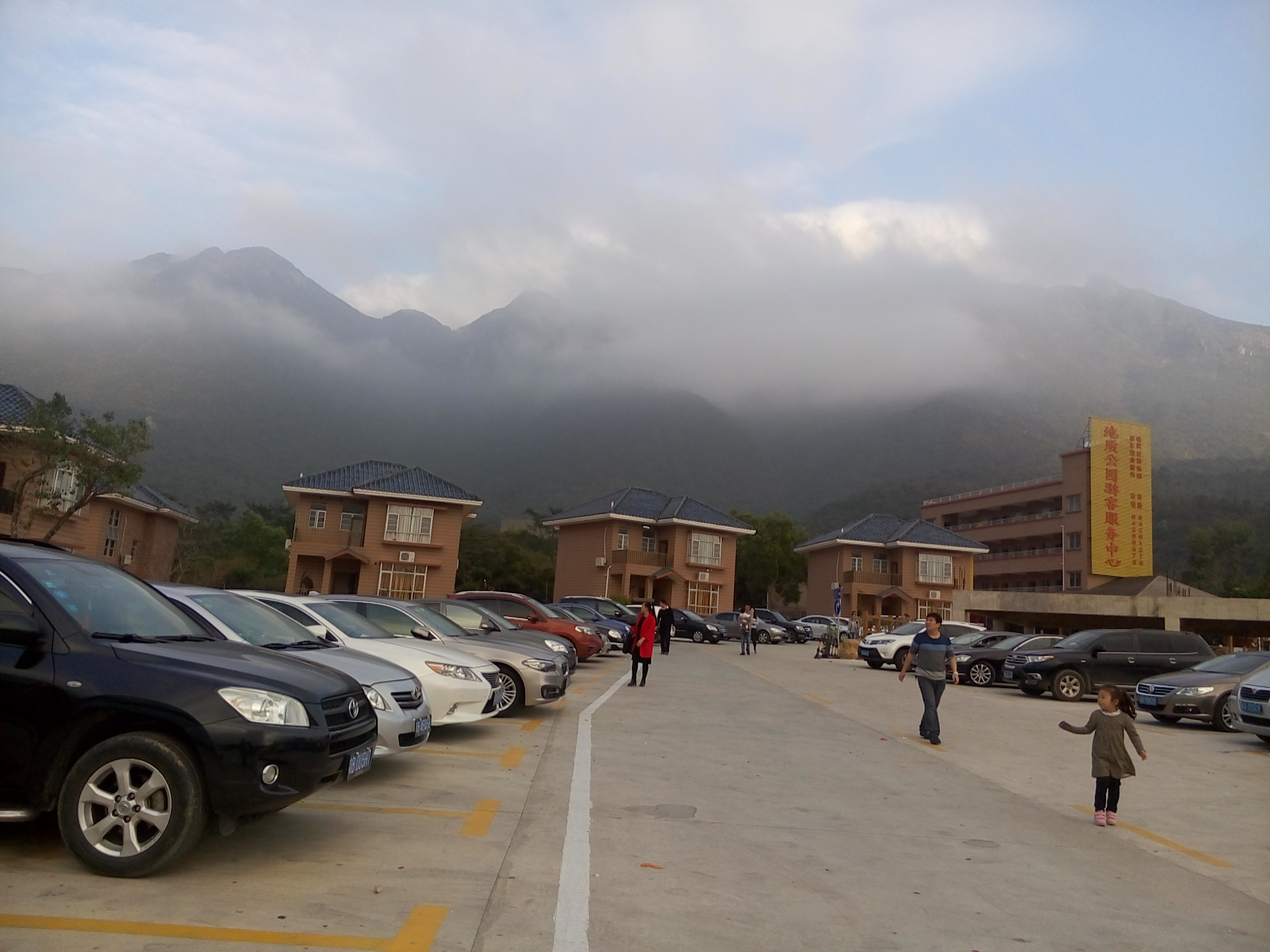 Dapeng Peninsula